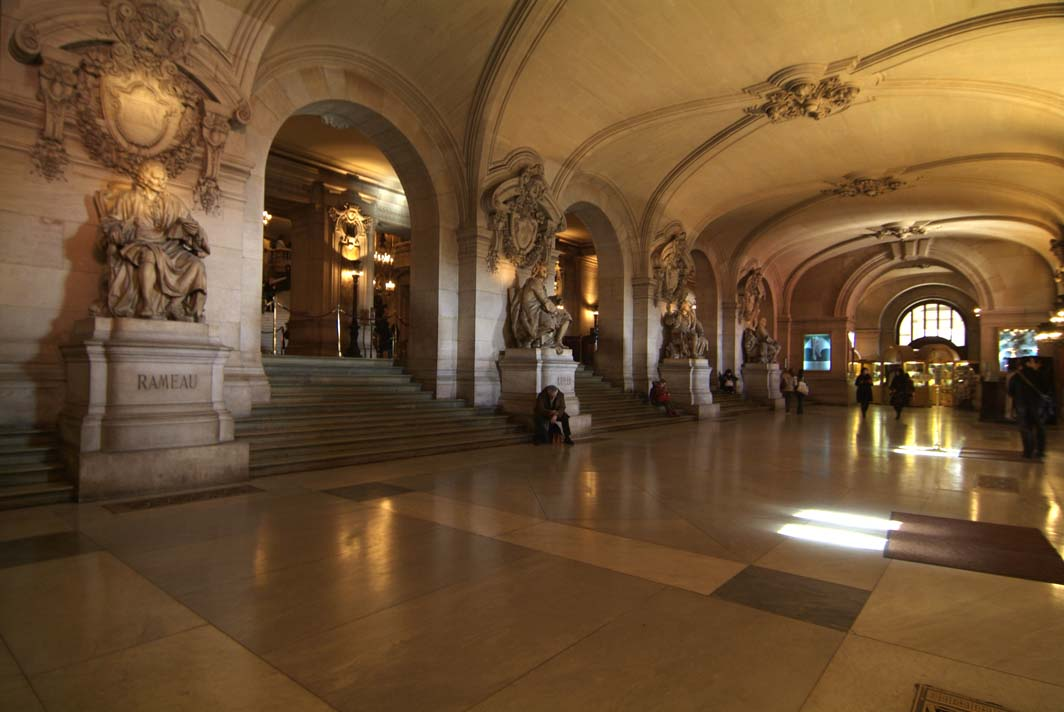 Vestibule of the Garnier Opera House, Paris / Vestibule de l’opéra Garnier, à Paris